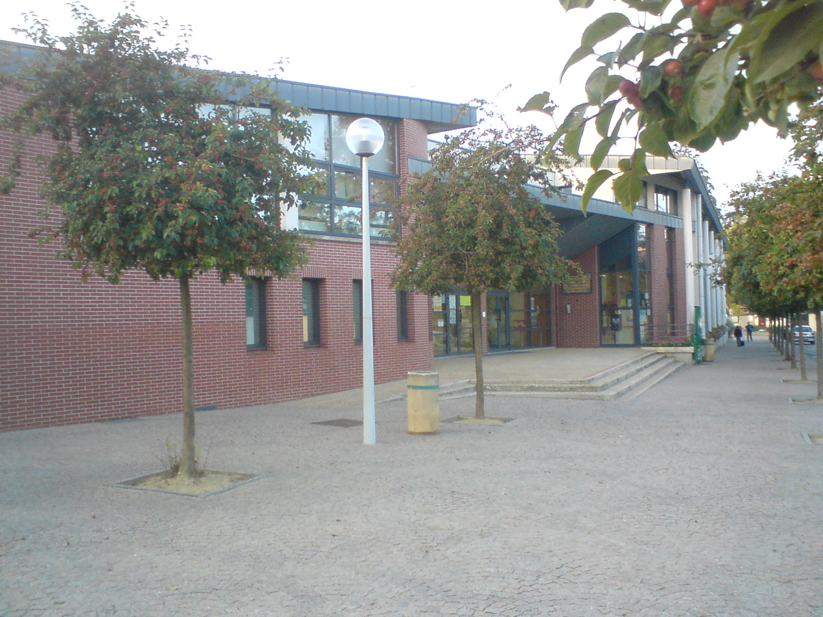 École Georges Brassens, Crosne, Essonne